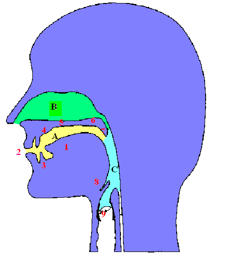 Schéma artikulačního ústrojí s vyznačením jeho částí: A - ústní dutina (cavum oris), B - nosní dutina (cavum nasi), C - hltan (pharynx) 1 - jazyk (lingua), 2 - rty (labia), 3 - zuby (dentes), 4 - dásňový oblouk se sklípky (alveoli), v nichž jsou usazeny zuby, 5 - tvrdé patro (palatum durum), 6 - měkké patro (palatum velum) 7 - čípek (uvula), 8 - hrtanová záklopka (epiglottis), 9 - hlasivky (glottis).